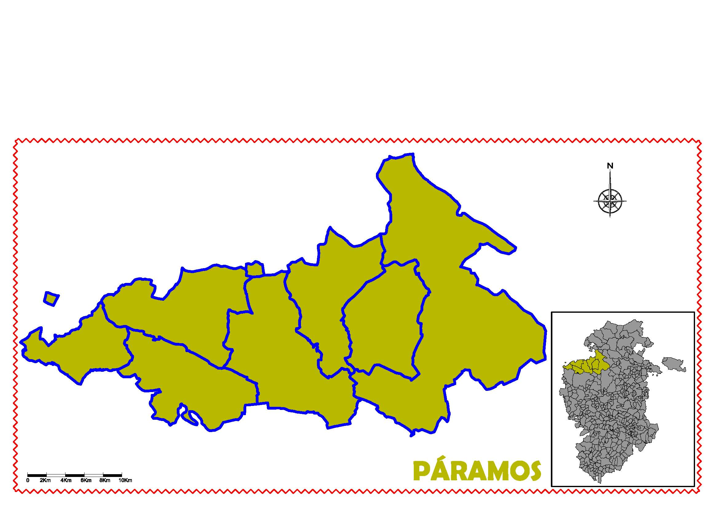 Ubicación de la comarca "Páramos" en la provincia de Burgos